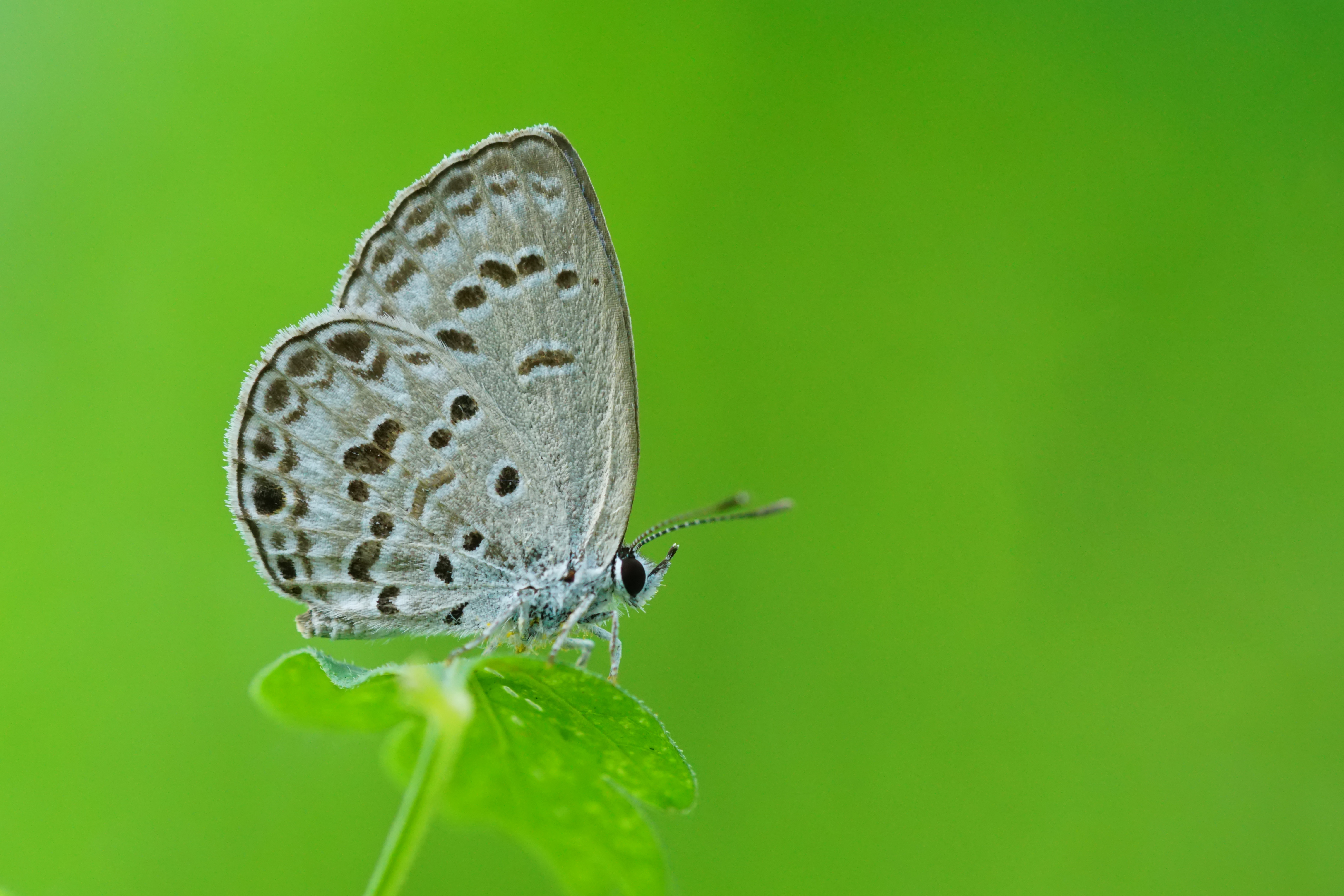 綺灰蝶 Chilades laius koshuensis 濕季型